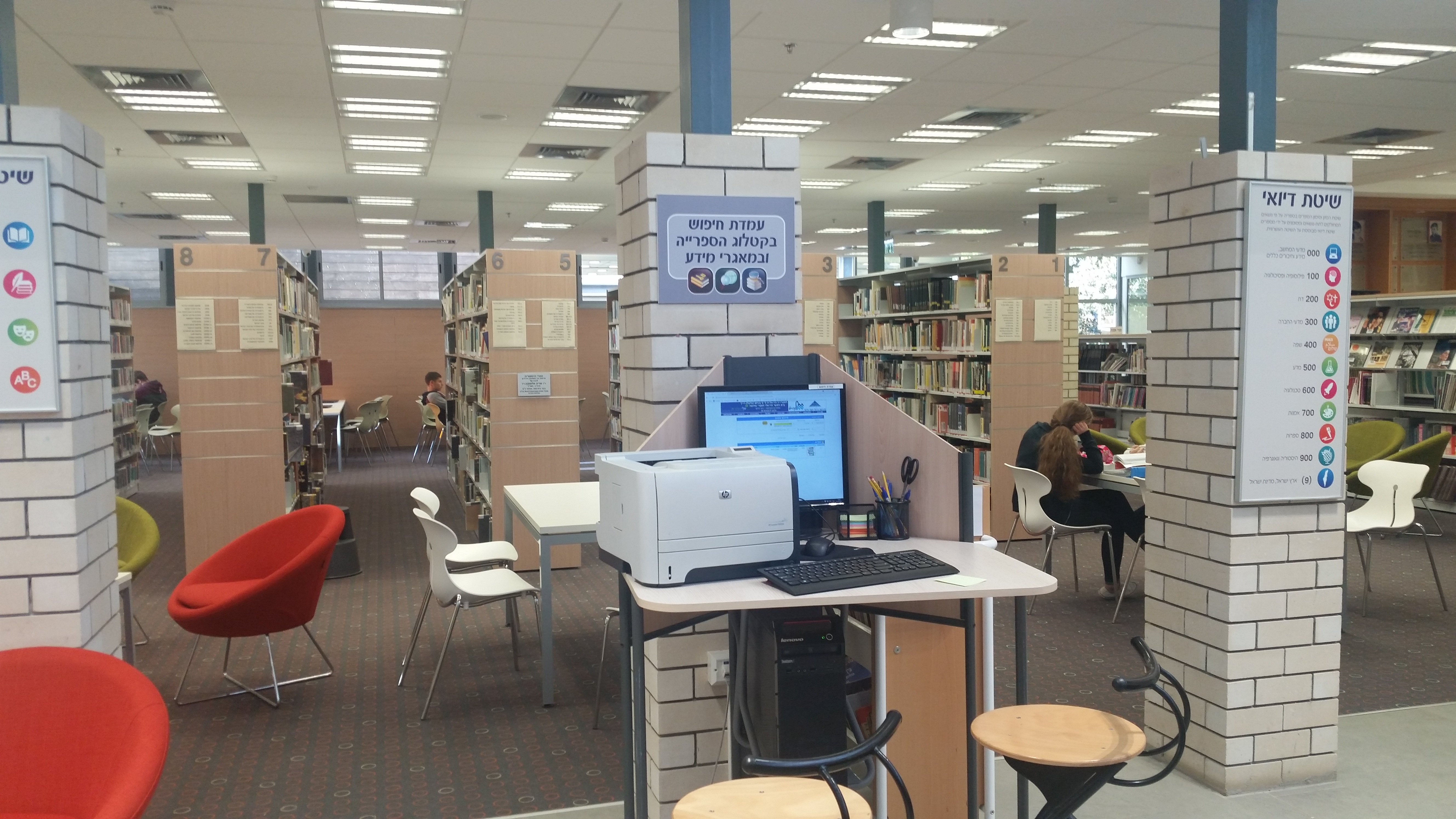 קמפוס בית בירם שוכן על הכרמל שייך לבית הספר הריאלי ספריית בית בירם